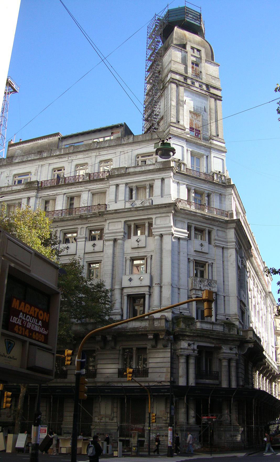 Vista desde la calle Santiago del Estero del edificio construido para la Caja Internacional Mutua de Pensiones, luego Hotel Majestic. Actualmente sede de la Administración General de Ingresos Públicos, en restauración. Buenos Aires, Argentina